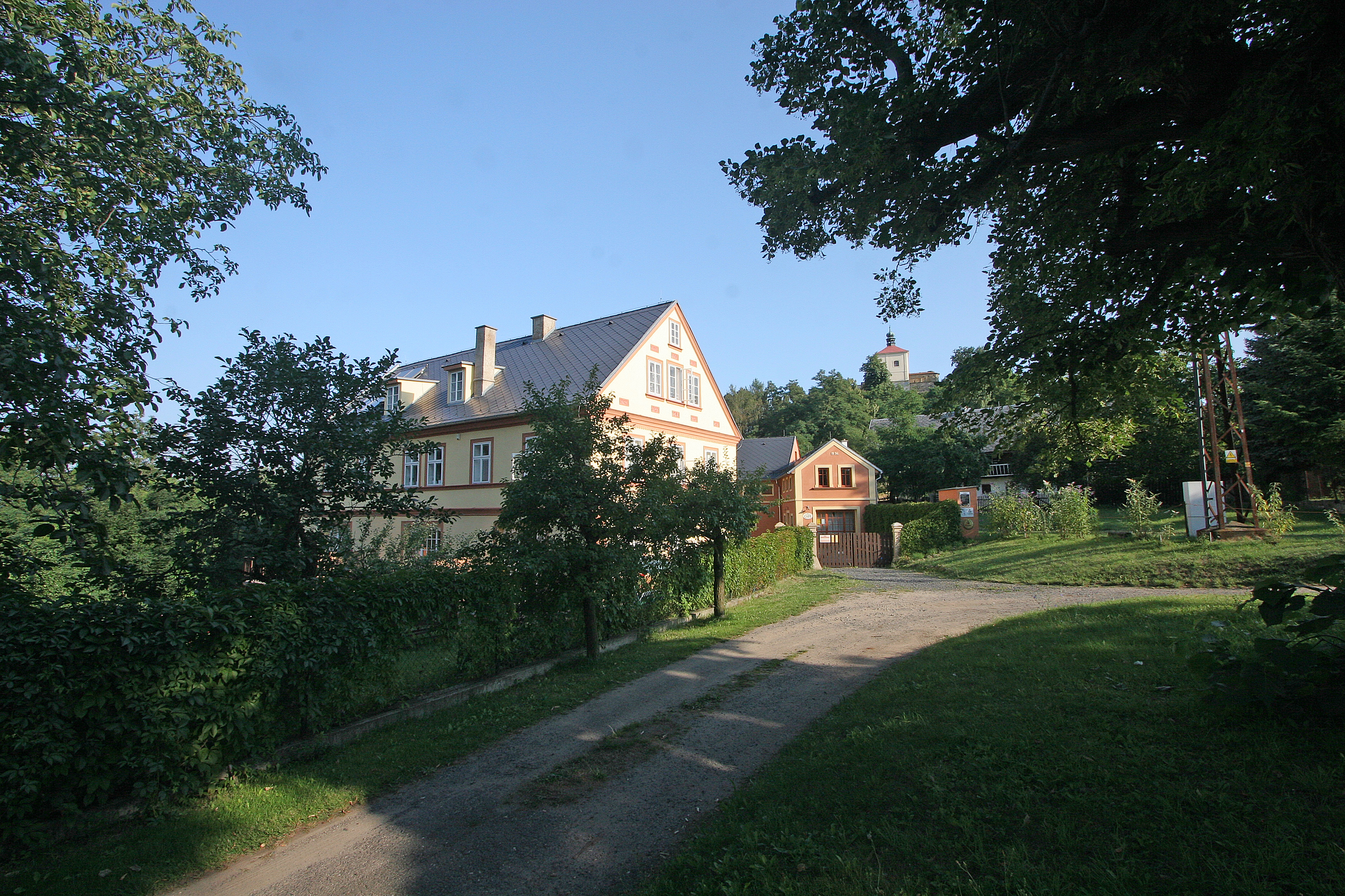 Ostré Pension Pod kalvárií